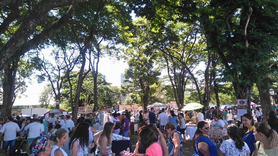 Movimentação na Feira.